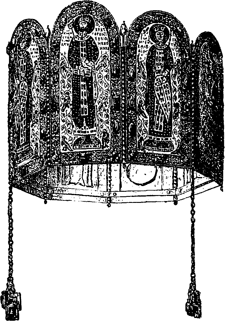 Krone Konstantin Monomachos